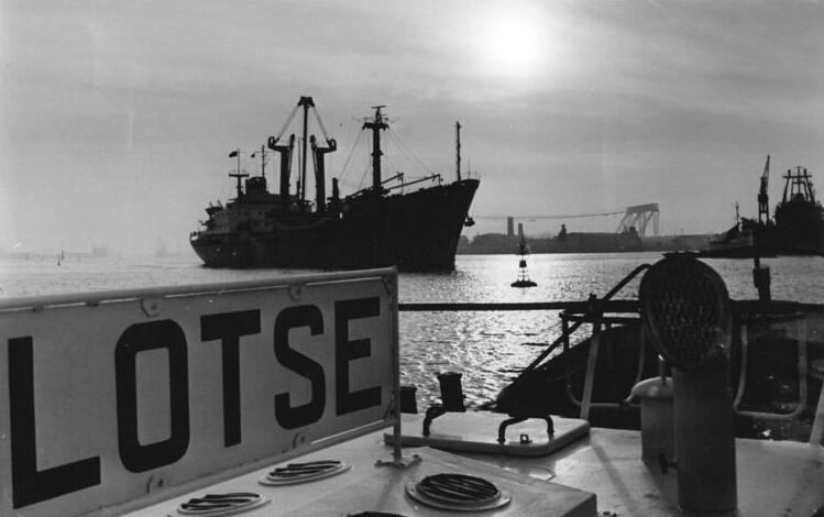 Rostock, Überseehafen, Lotsenboot ADN-ZB Sindermann 15.12.71 Rostock: Lotsen leiten die Schiffe schnell und sicher. Als wichtige Kooperationspartner der DDR-Seehäfen tragen Lotsen und Schlepperbesatzungen der Bagger-, Bugsier- und Bergungsreederei Rostock dazu bei, daß die Werktätigen der Seeumschlagsplätze auch beim erhöhten Jahresendverkehr ihren Aufgaben beim Verladen und Löschen von Import- und Exportgütern gerecht werden können. Kurs Südostasien läuft der Frachter "Nienburg" der Deutschen Seereederei aus dem Rostocker Überseehafen - geleitet von einem Lotsen erreicht er sicher durch den Seekanal die offene See. (Bitte beachten Sie hierzu unser Foto K1215-13n)